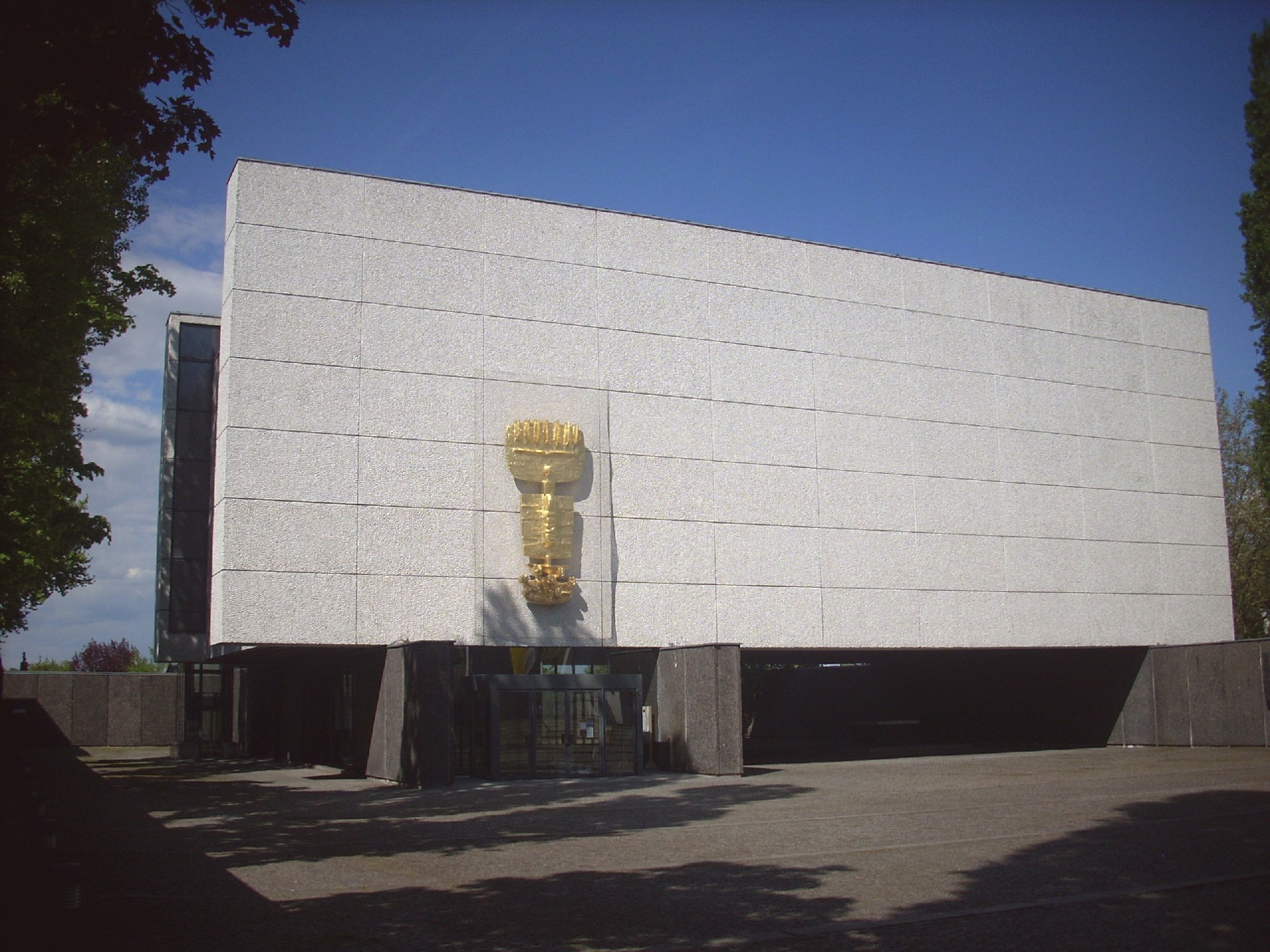 Berlin, katholische Kirche Maria Regina Martyrum